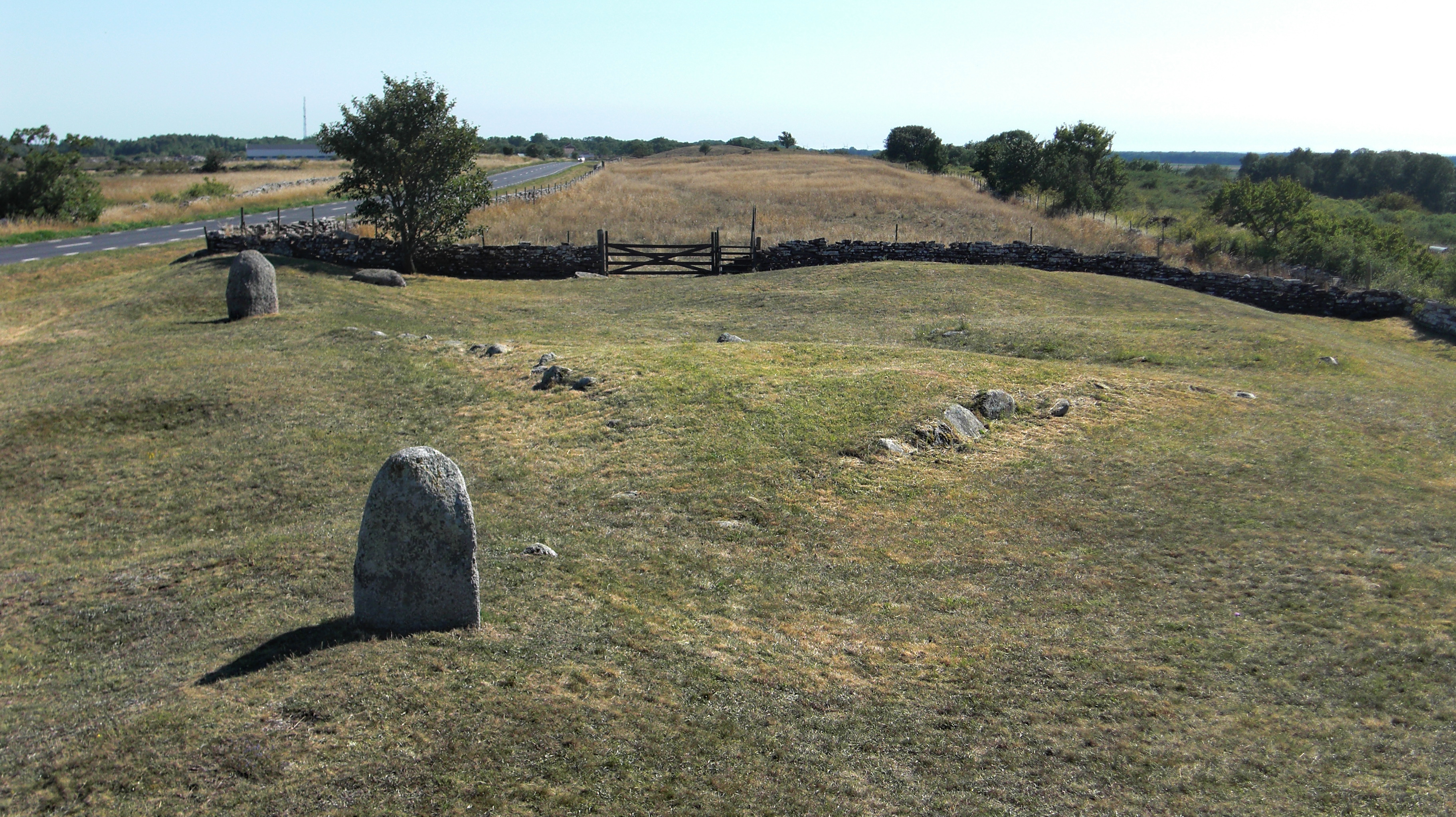 Treudd på järnåldersgravfält (Raä-nr Resmo 40:1) beläget utmed landsvägen i Resmo socken, Mörbylånga kommun, Öland, Kalmar län, Sverige.